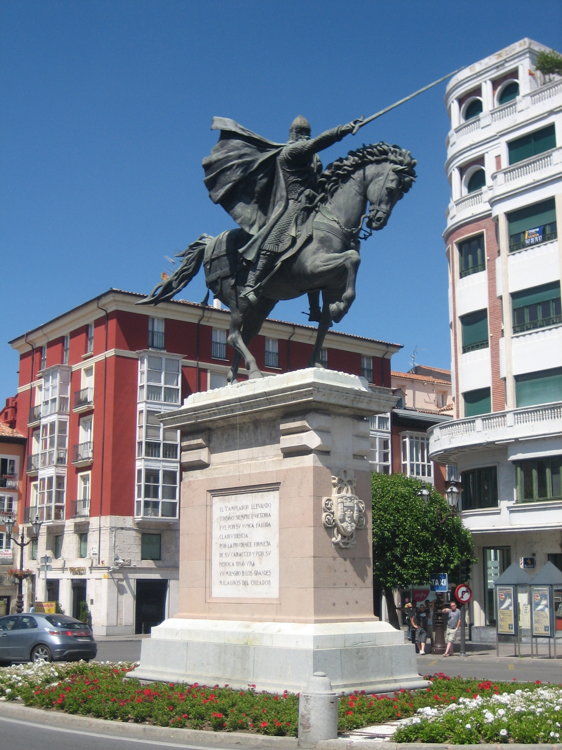 estatua de El Cid en la cabecera del puente de San Pablo, en Burgos